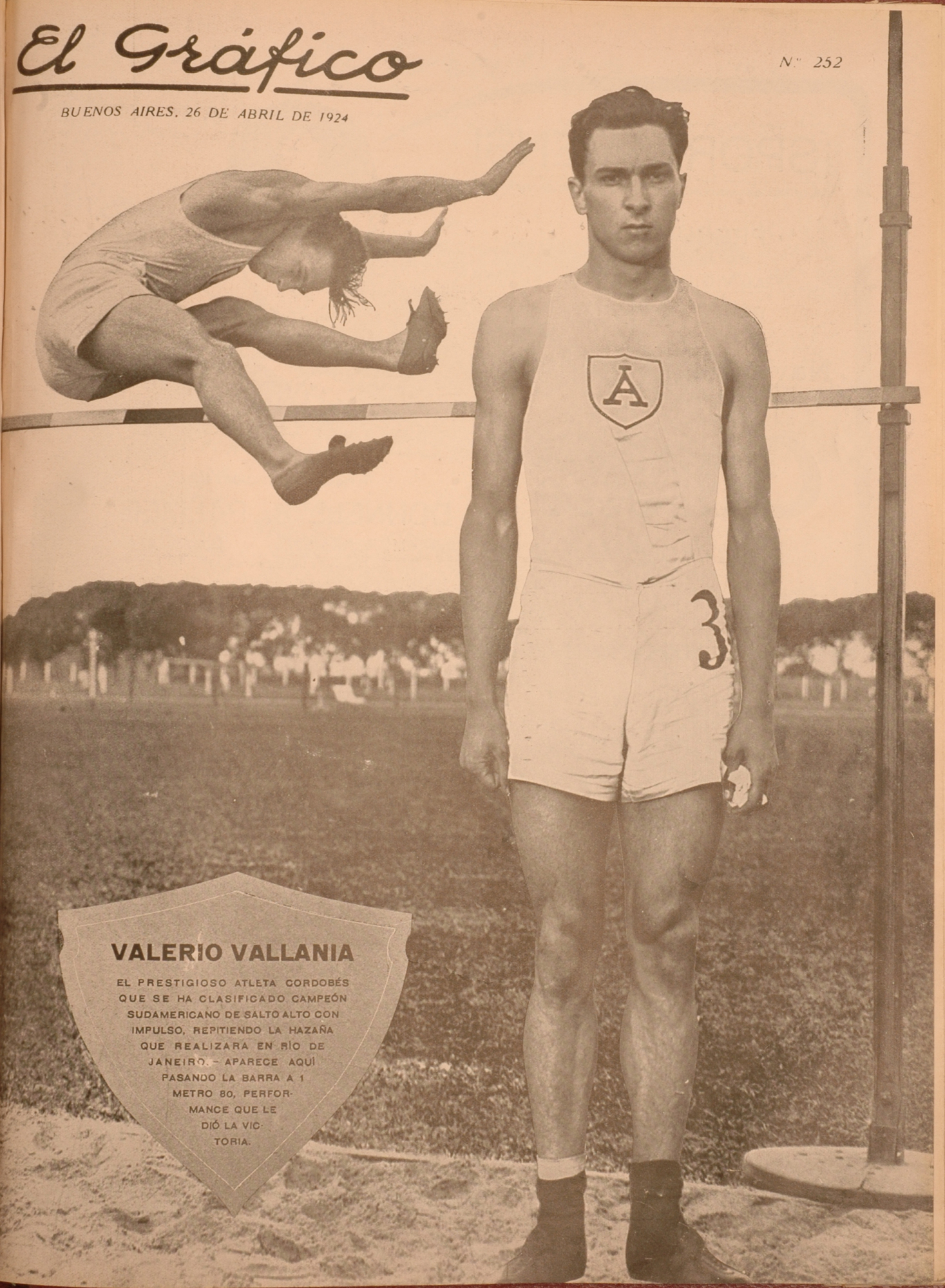 El Grafico del 26 de Abril de 1924. Edicion 252